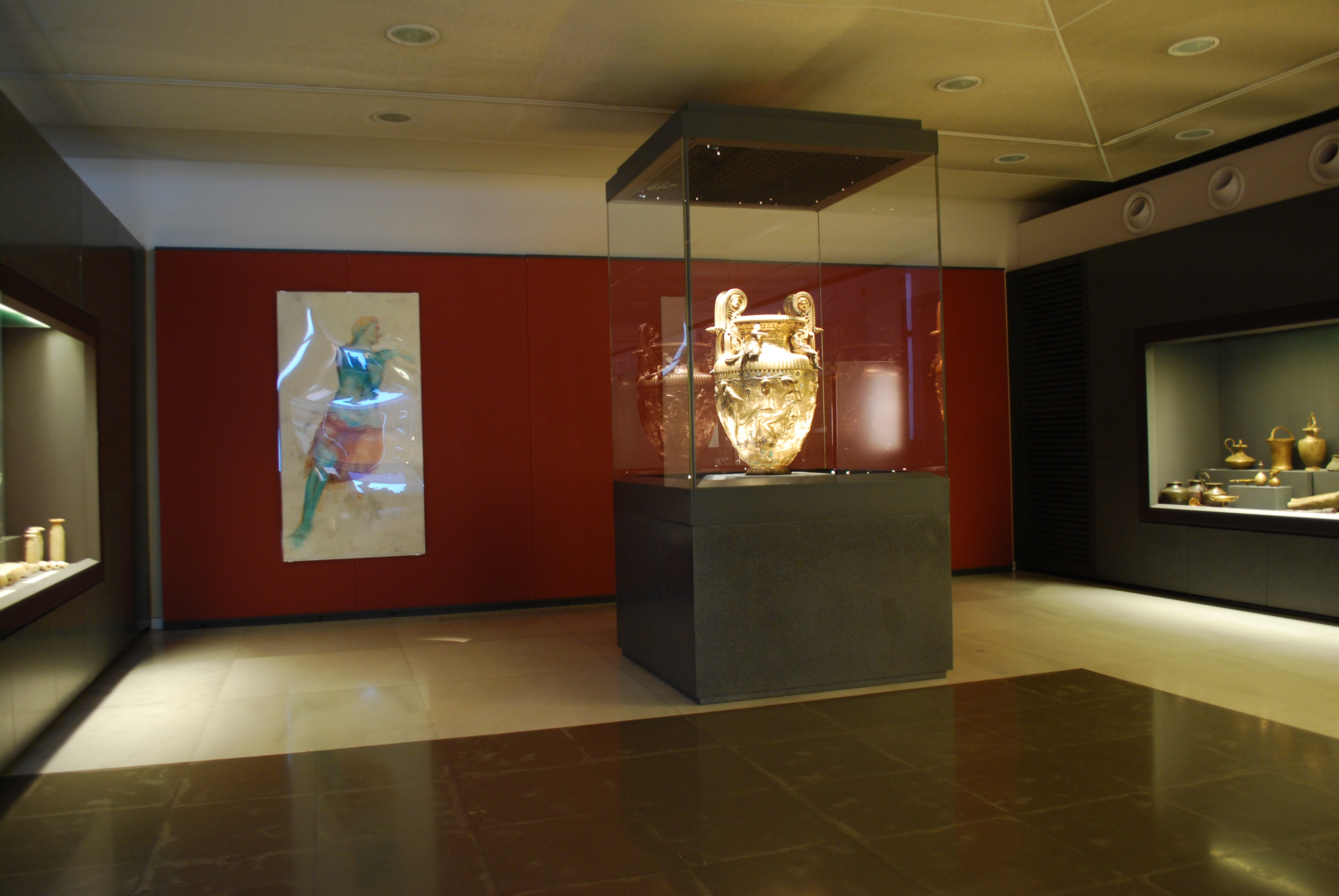 Vue de Thessaloniki.